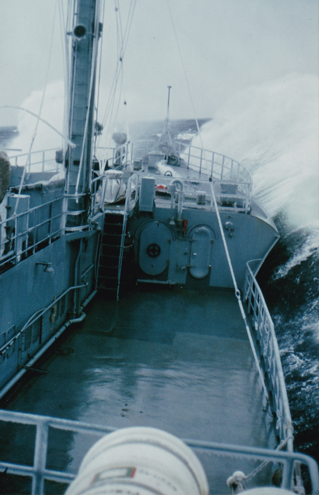 Schiff in stürmischer See